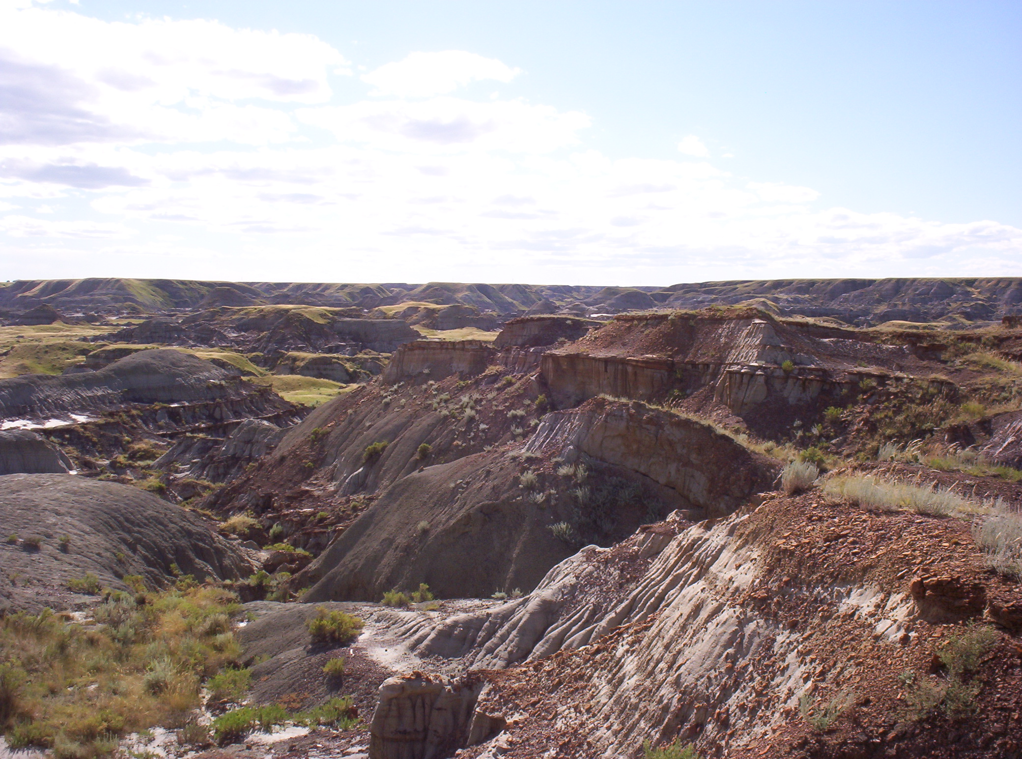 Parc provincial Dinosaur.